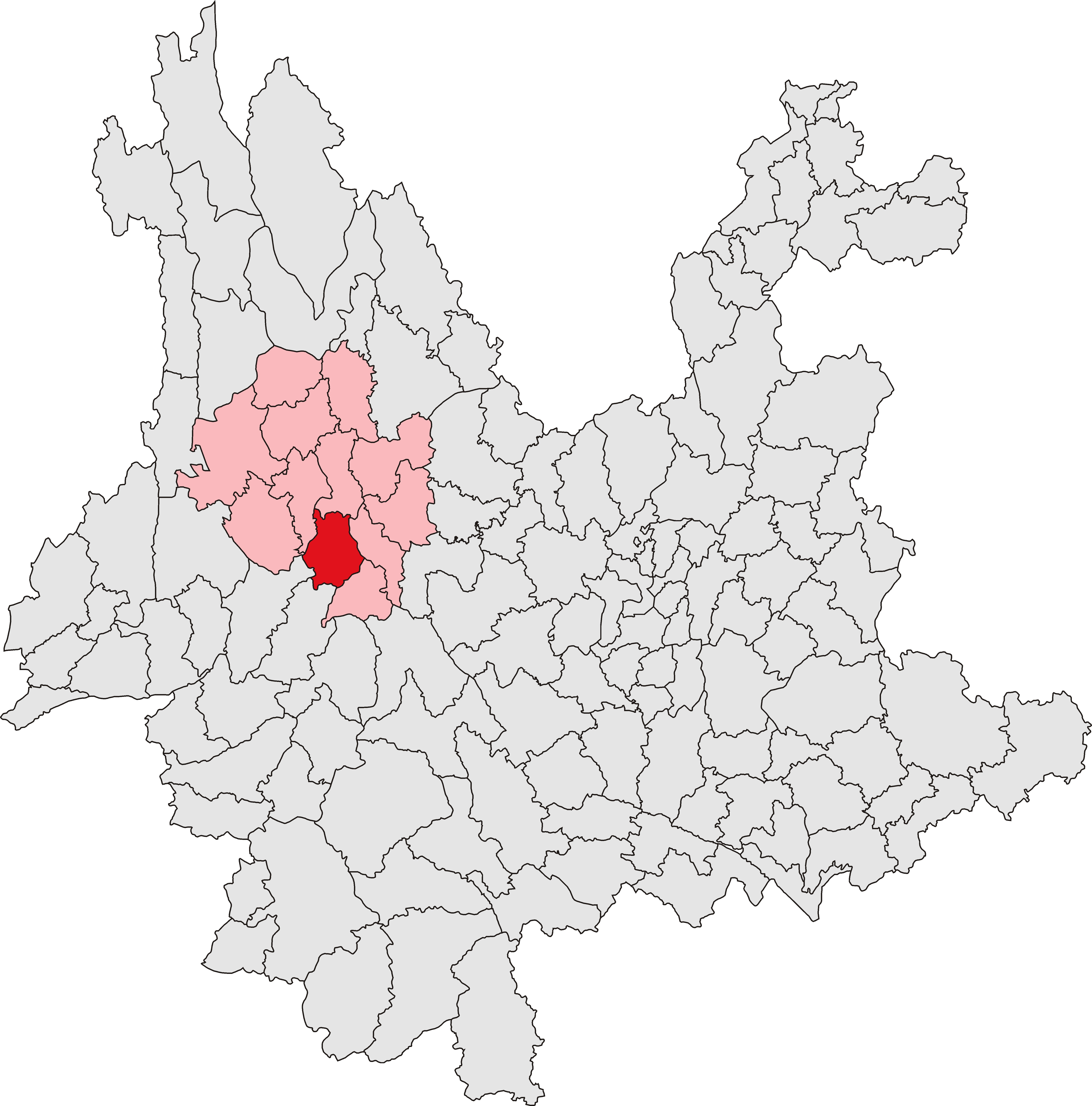 中文（中国大陆）: 巍山彝族回族自治县位置图